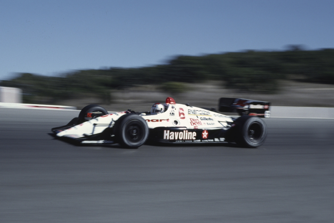 Mario Andretti in a CART race at Laguna Seca in 1991.